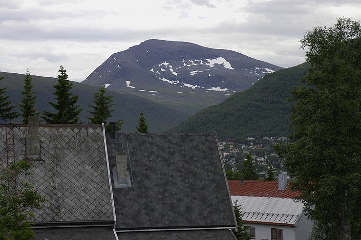 Tromsdalstinden sett fra Th. Øiens gate i Tromsø. Foto: Krister Brandser